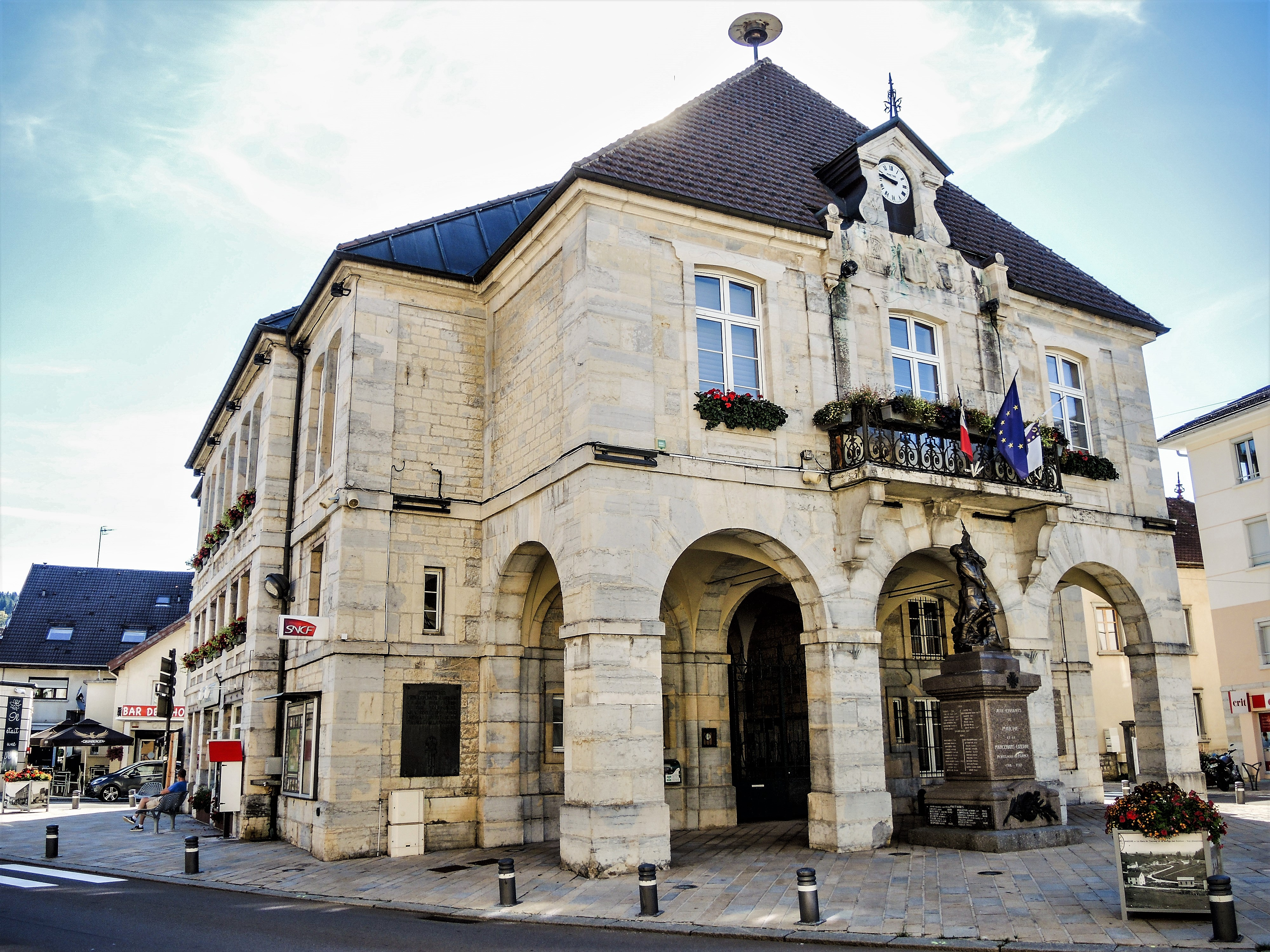 Mairie der Maîche. Doubs